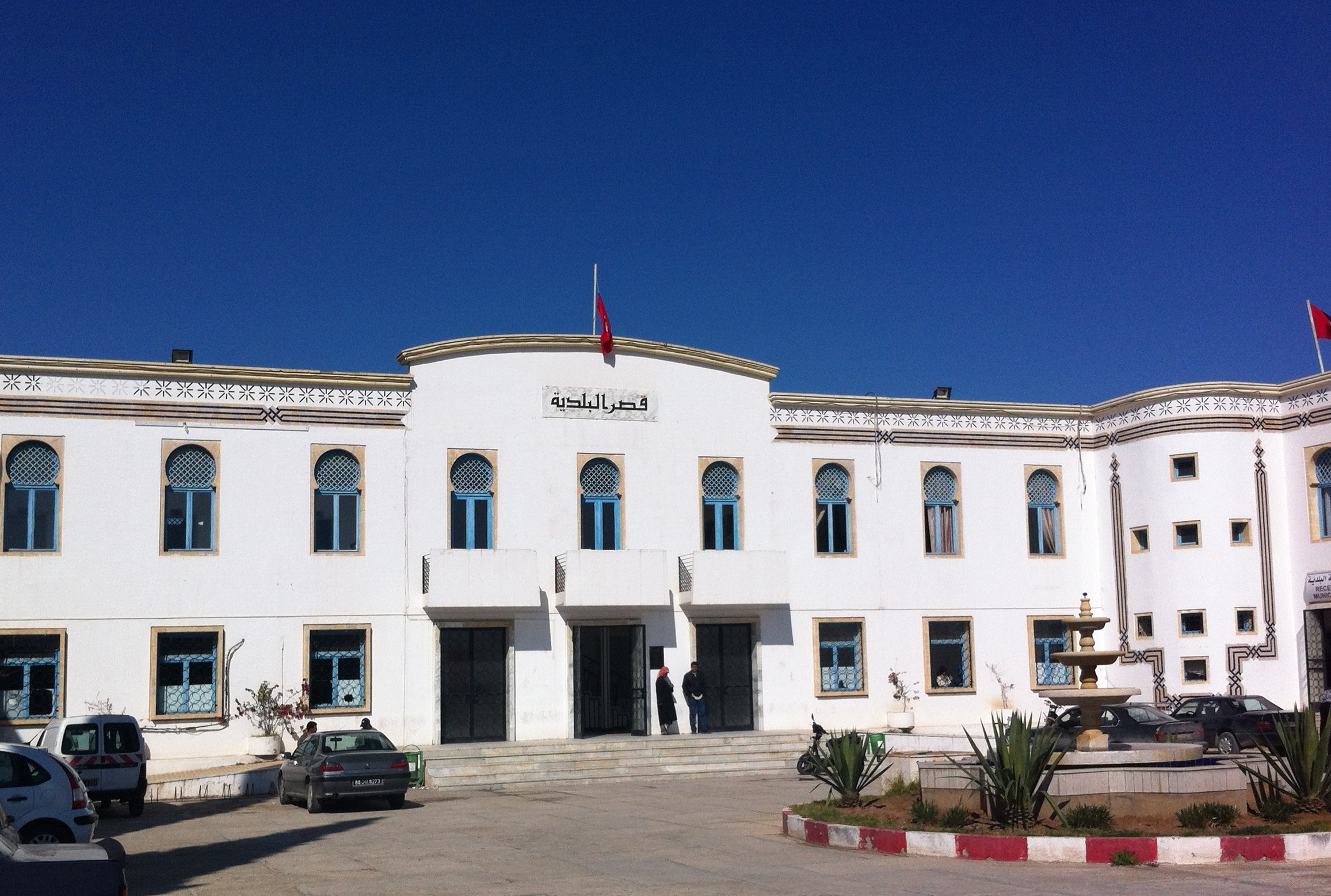 Façade de la municipalité de Msaken, ville du Sahel tunisien